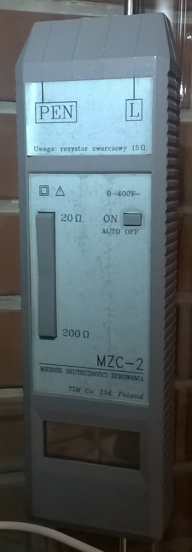 Ok. 200 pierwszych egzemplarzy miernika MZC-200 posiadało szarą obudowę, z drukowanymi w pionierskich warunkach naklejkami.